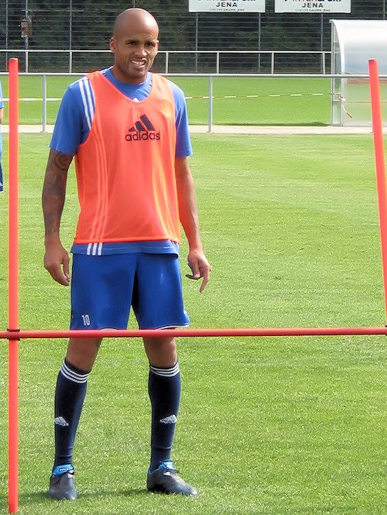 Orlando Smeekes beim Training am 11. September 2009 beim FC Carl Zeiss Jena